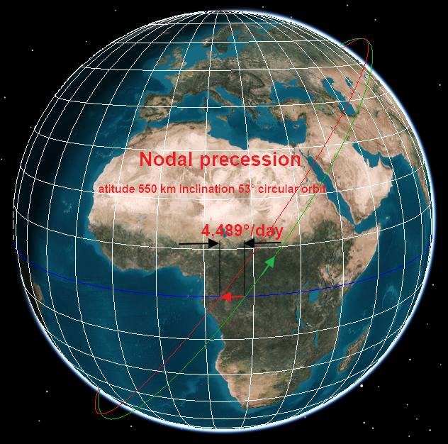 Nodal precession for 550 km altitude, inclination 53°